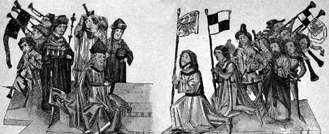 Sigismund fees the land Brandenburg to Frederik, April 30, 1415. Kaiser Sigismund belehnt Friedrich mit der Mark am 30. April 1415 Abbildung aus: Preußische Geschichte. Band 1: Geschichte der Mark Brandenburg im Mittelalter. Hermann Brosien. Freytag Verlag, Leipzig, 1887